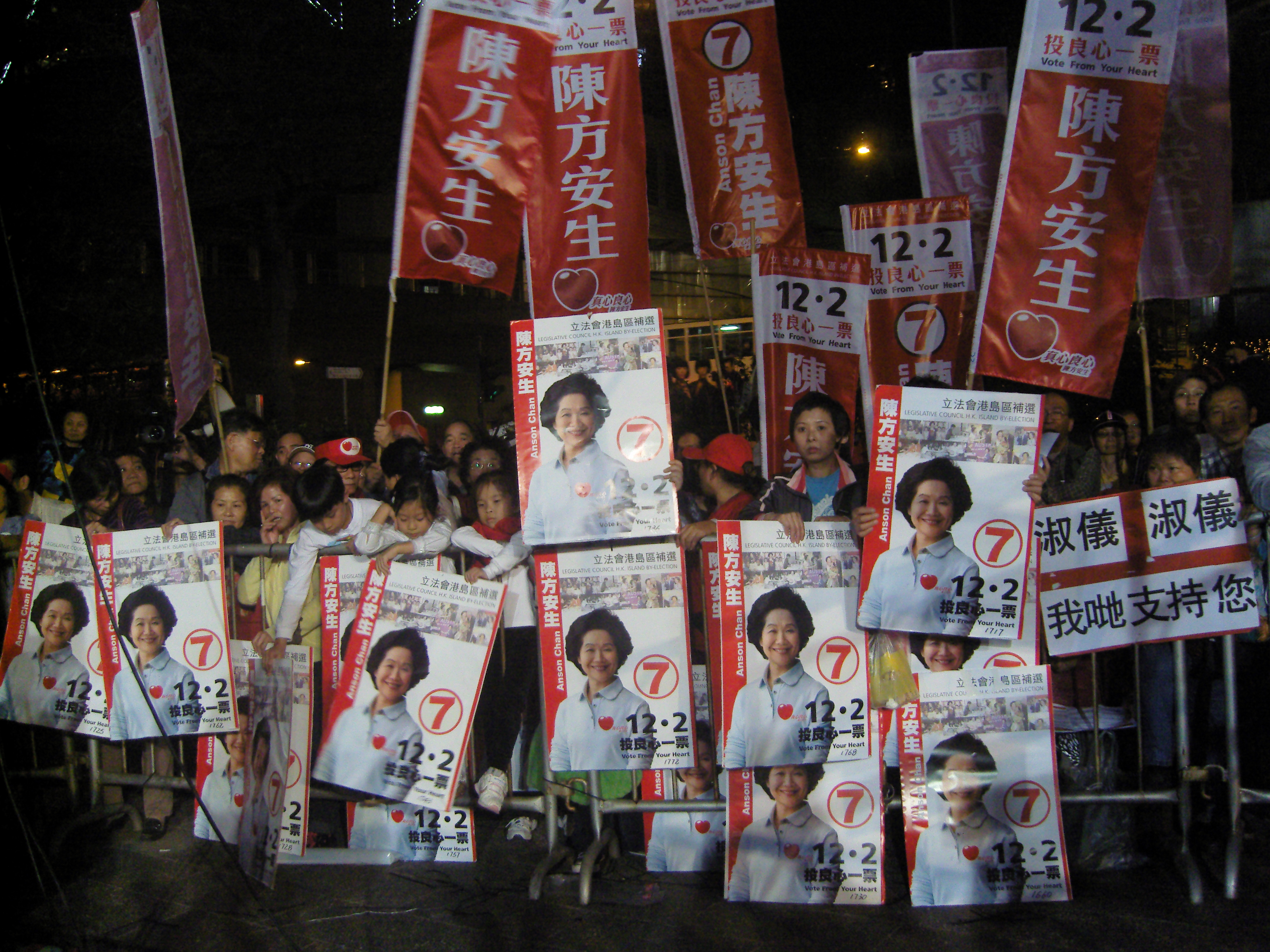 香港立法會港島區補選八大傳媒選舉論壇。